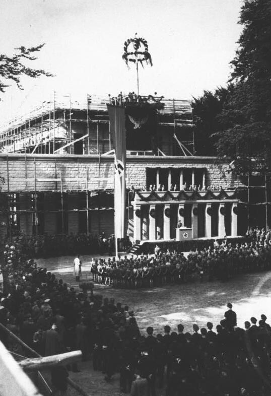 Richtfest der Akademie für Jugendführung in Braunschweig. Am Freitagnachmittag wurde in Braunschweig nach nur sieben Monaten Bauzeit das Richtfest der Akademie für Jugendführung gefeiert. Der Jugendführer des Deutschen Reiches Baldur von Schirach, dem die Stadt Heinrichs des Löwen an diesem Tage das Ehrenbürgerrecht verlieh, sprach im Rahmen dieser Feierstunde, von der dieses Übersichtsbild berichtet, über die Bedeutung der geistigen Werte für die Erziehung des neuen deutschen Menschen. Scherl Bilderdienst, Berlin 4.6.1938